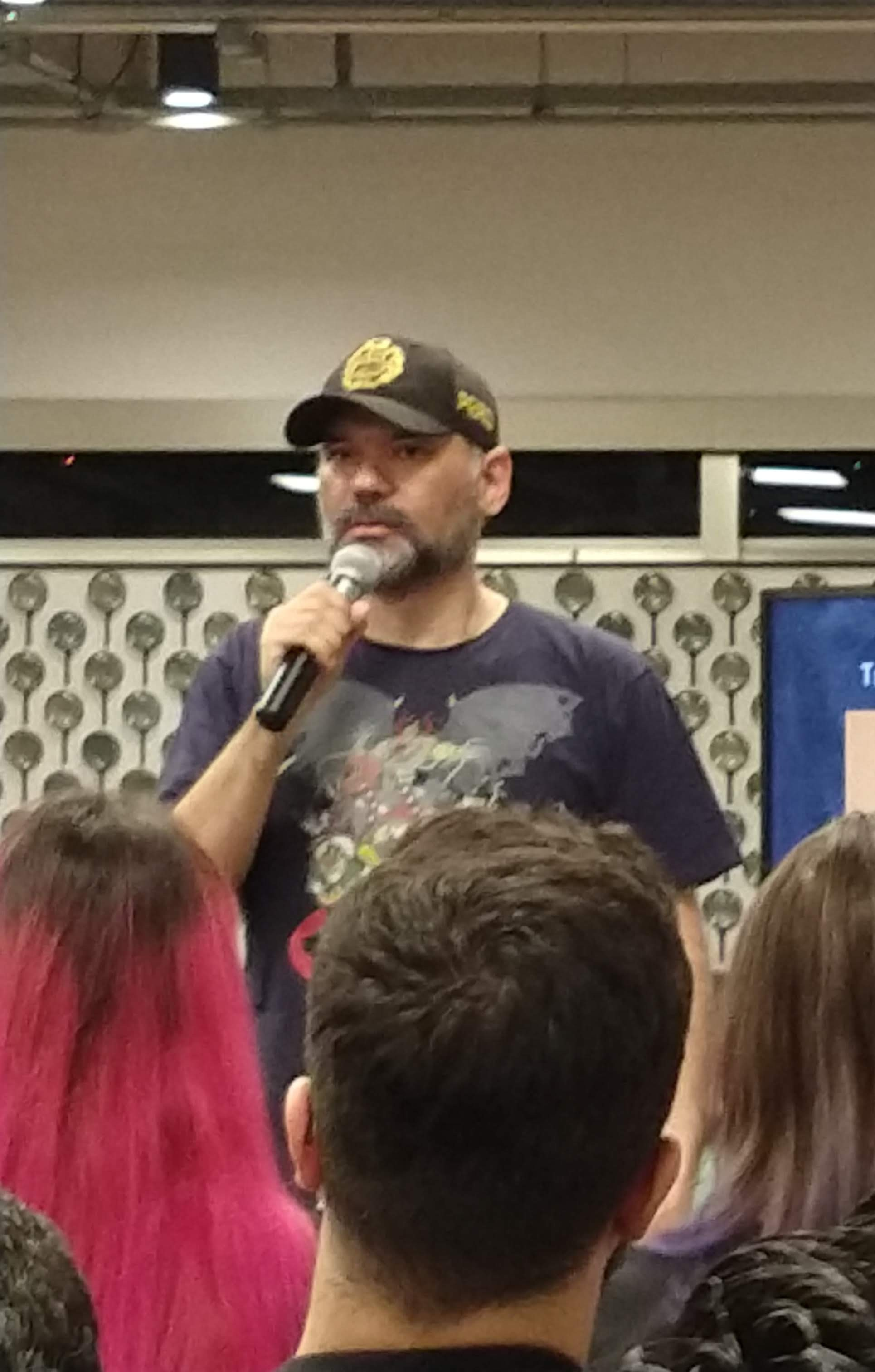 André Vianco ministrando aula no Sesc Paulista para o curso - Da idéia ao livro (2019)